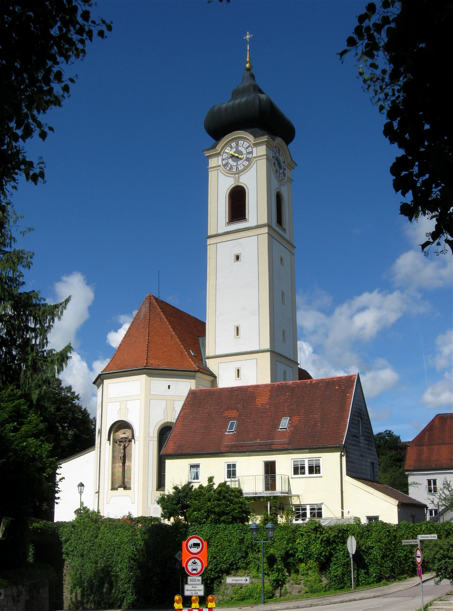 Hofberg 1; Kath. Stadtpfarrkirche St. Mariä Himmelfahrt, barocke Anlage, 1755/56 von Abraham Millauer nach Plan von Johann Michael Fischer; mit Ausstattung.